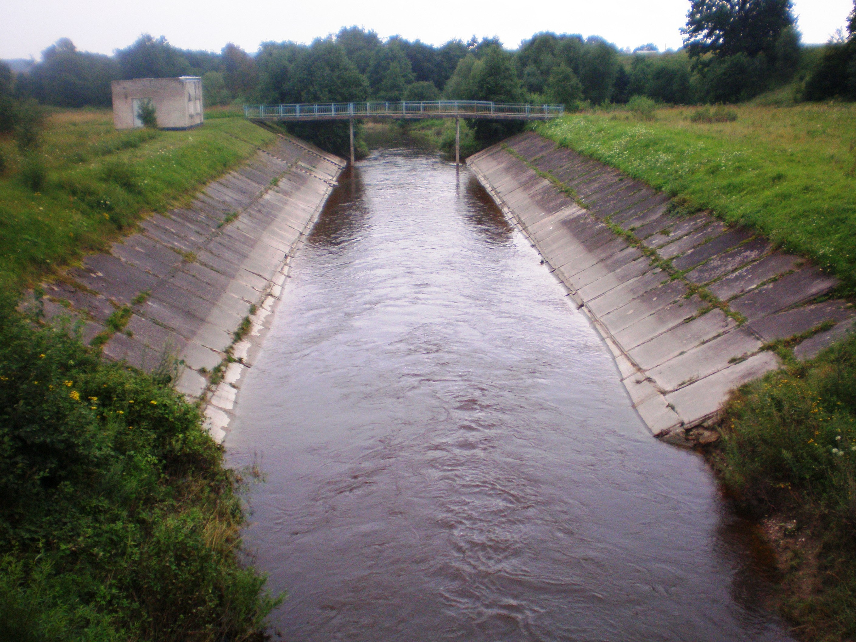 Mituva river